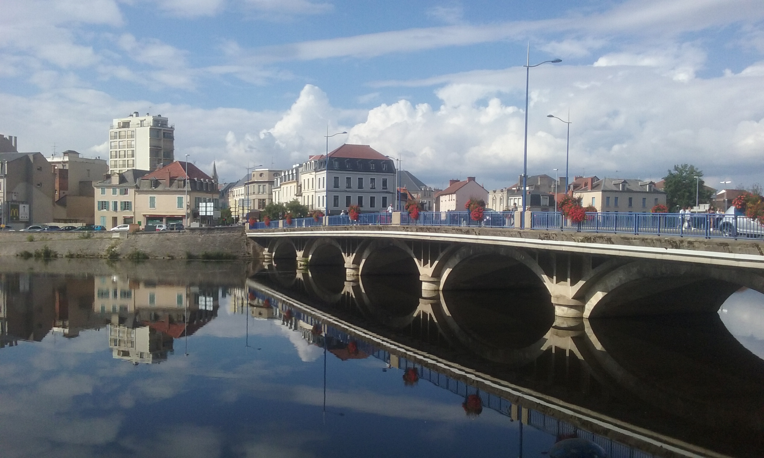 Pont Saint-Pierre, Montluçon.